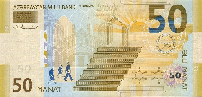 50 manat